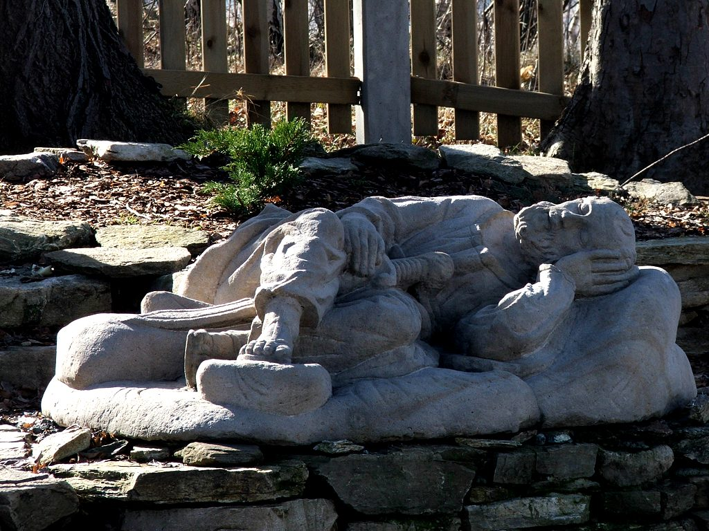 Góra Oliwna w Bolesławowie (Dolny Śląsk, Polska) – apostoł